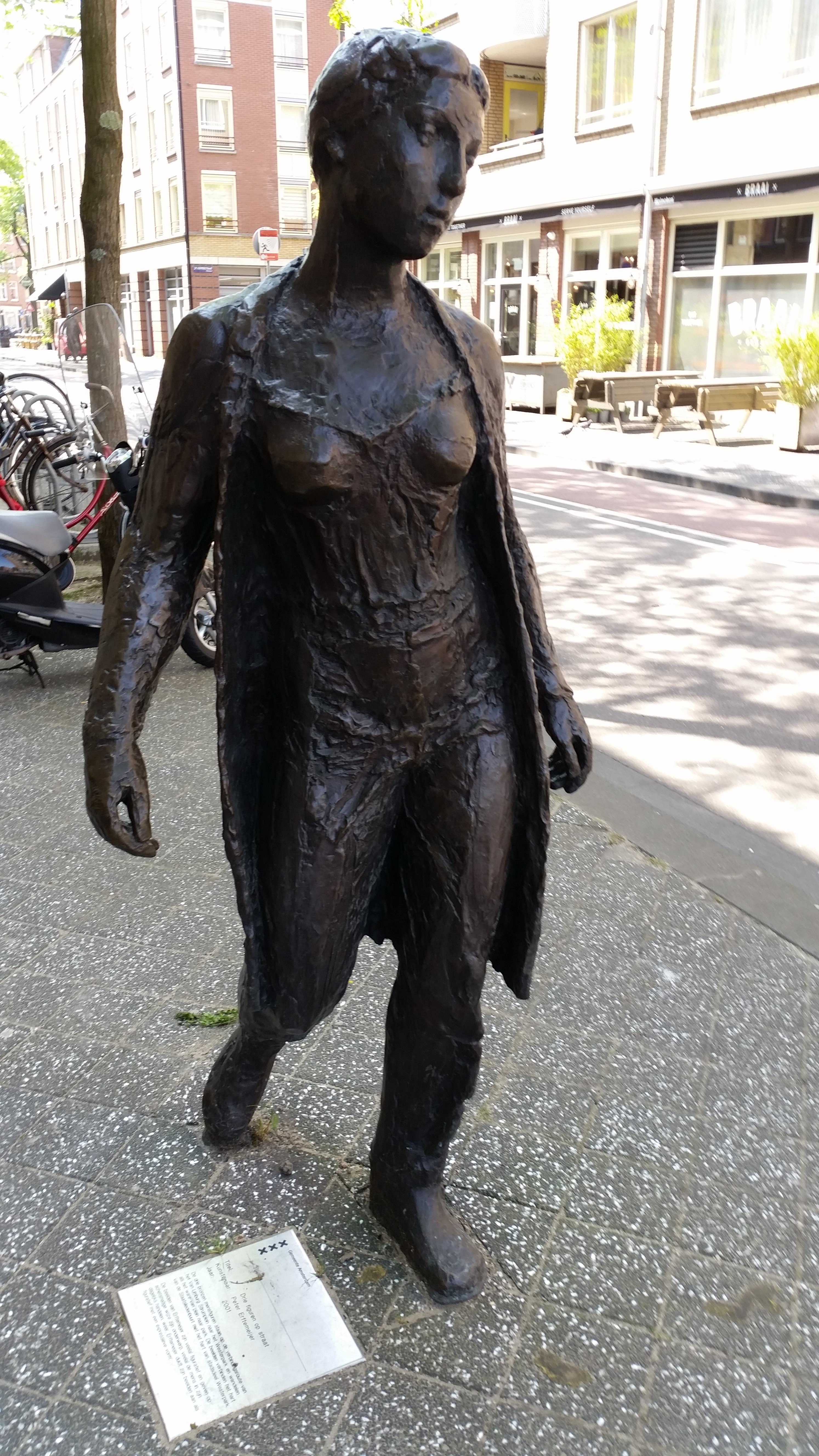 Drie figuren op straat, persoon 2 in de Van Limburg Stirumstraat, Amsterdam, de vrouw